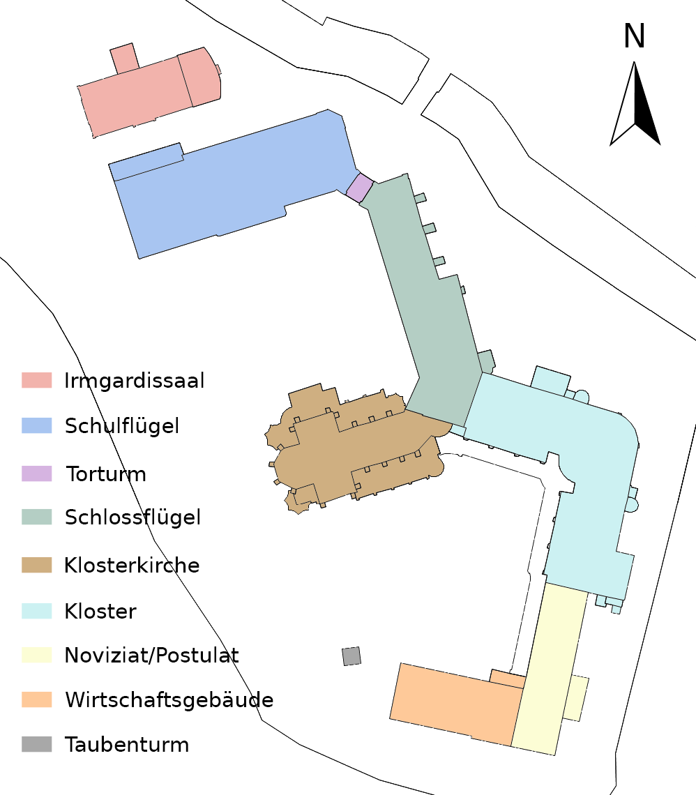 Schematischer Grundriss von Haus Aspel in Rees-Haldern